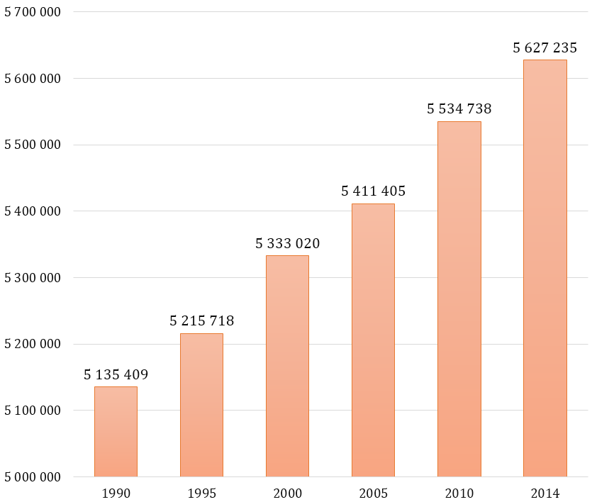 Население Дании 1990-2014